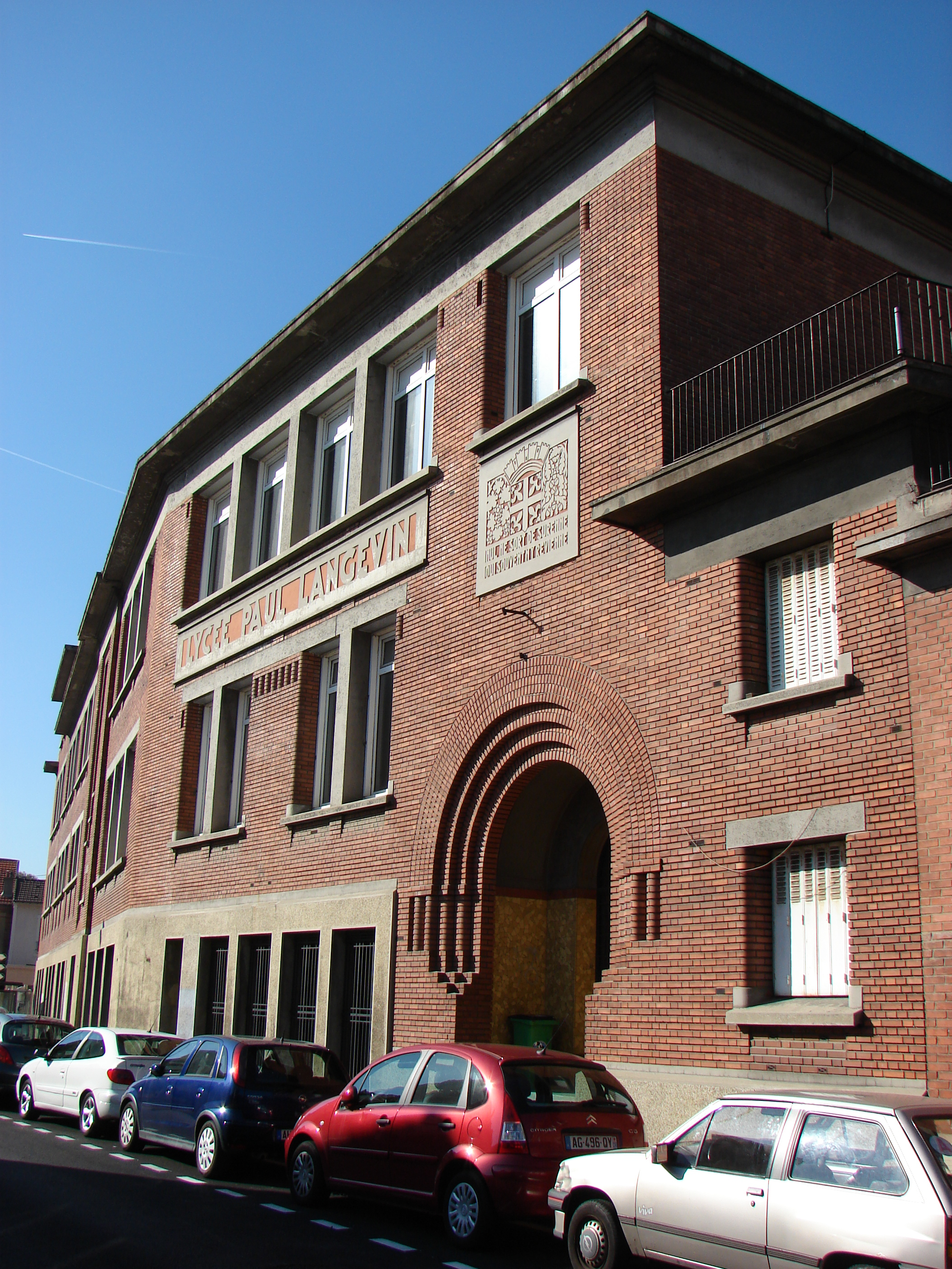 Lycée Paul-Langevin (Suresnes) (entrée de services)